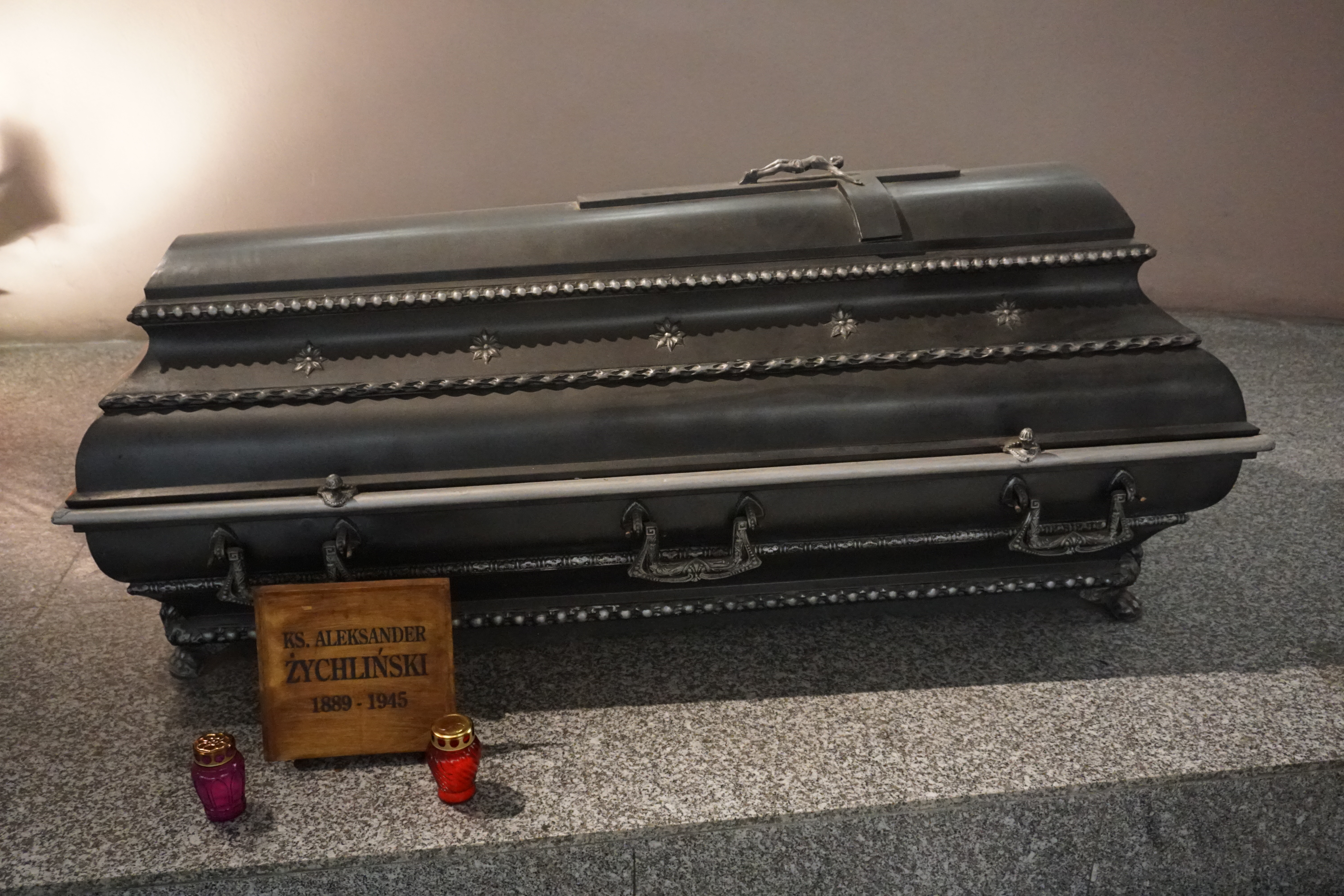 trumna z prochami ks.Aleksandra Żychlińskiego w Krypcie Zasłużonych Wielkopolan